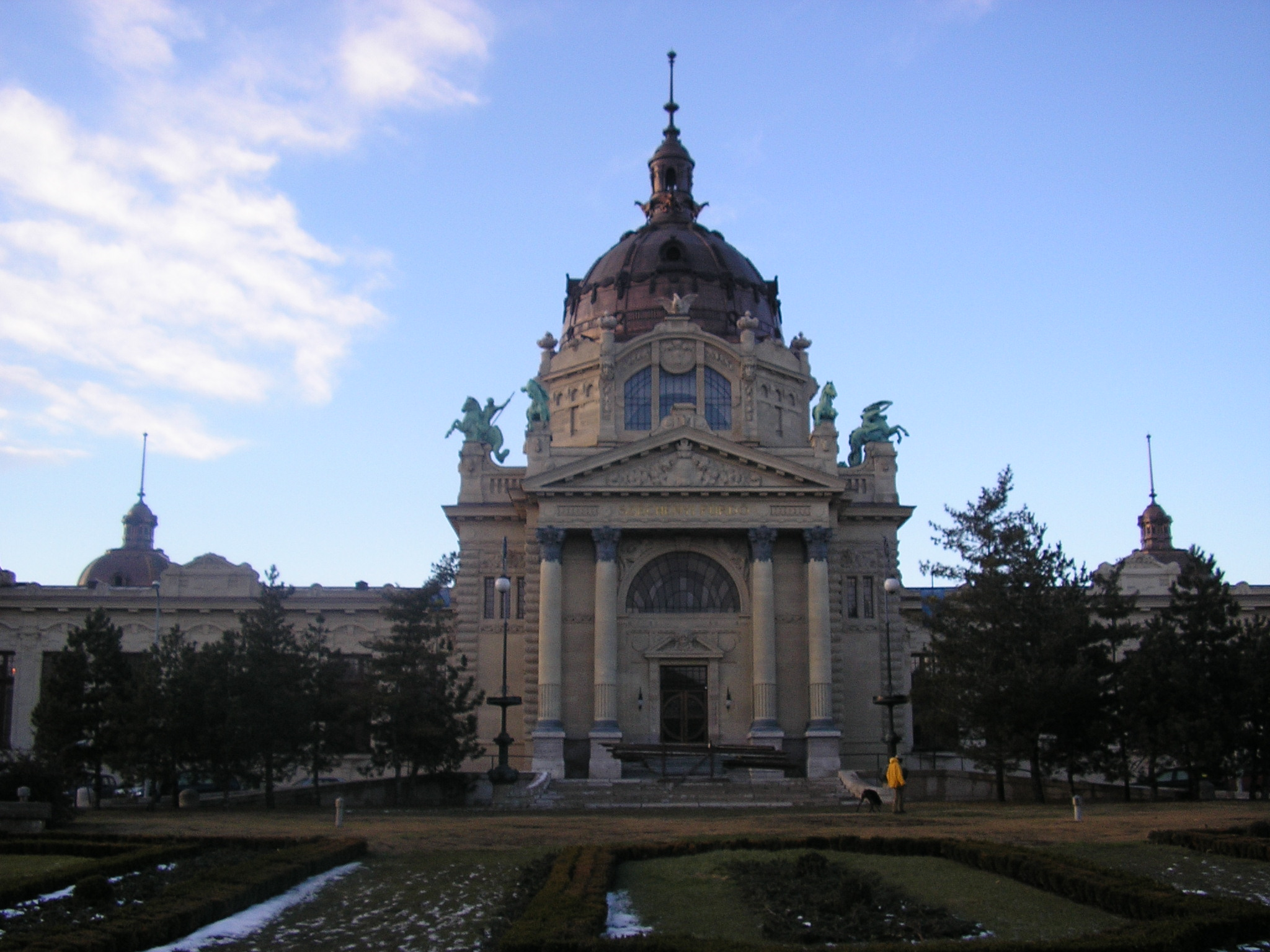 מרחצאות סצ'ני בבודפשט.